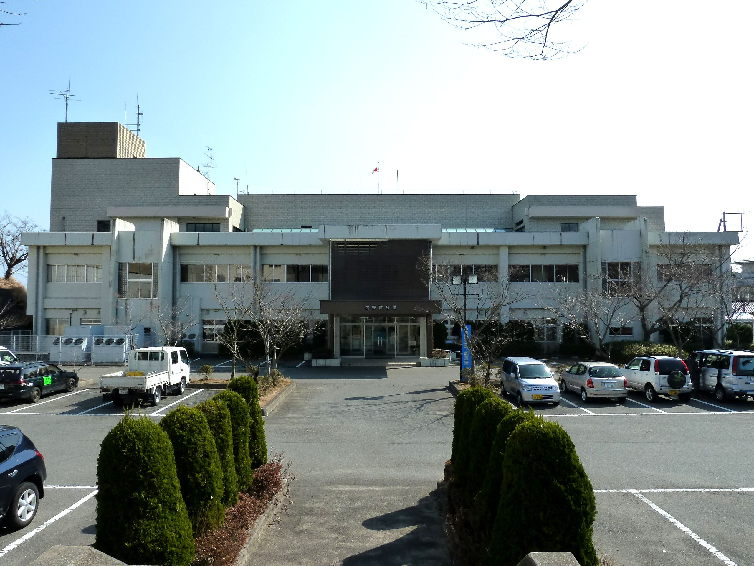 広野町役場